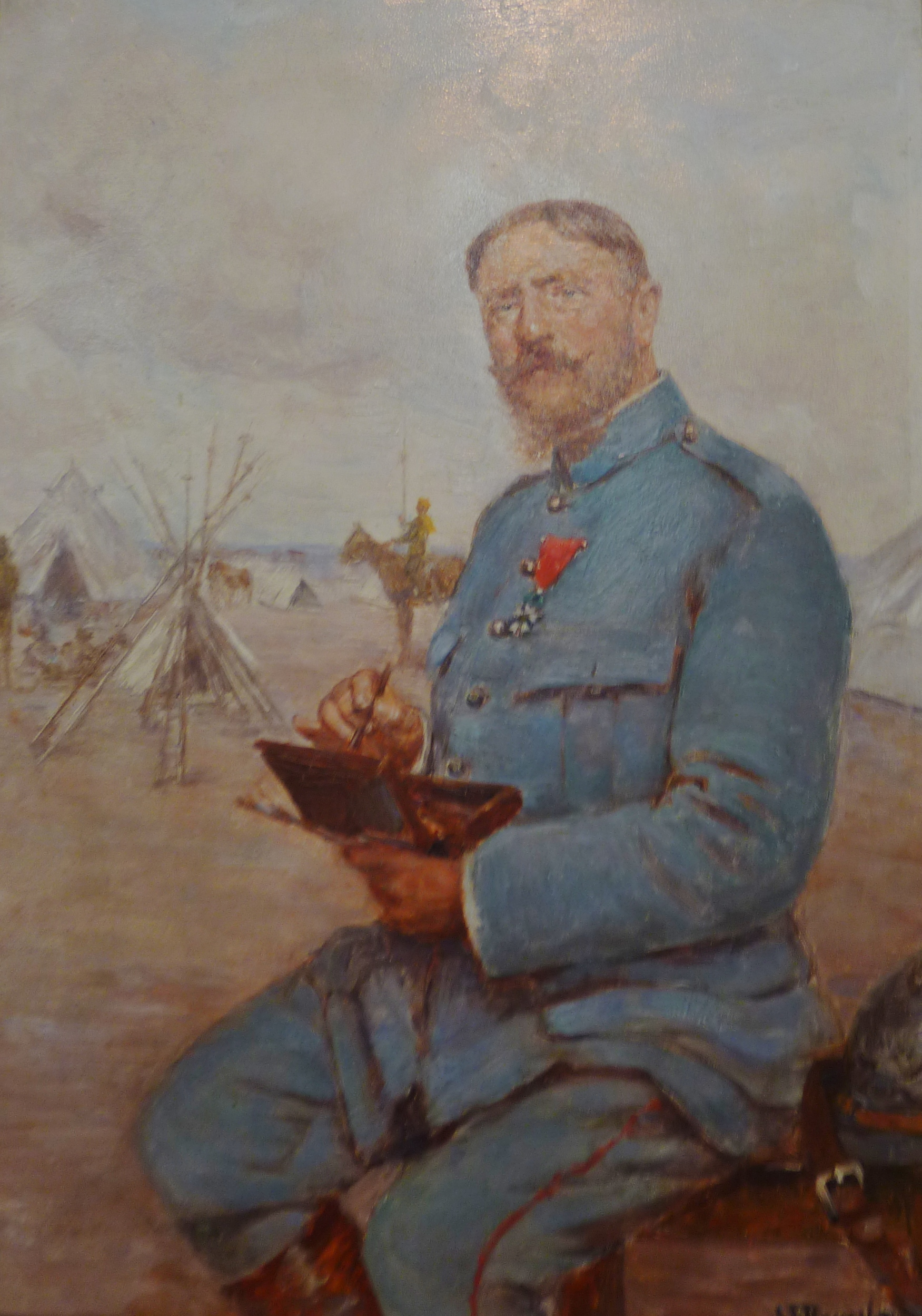 Joseph-Félix Bouchor (1853-1937) : Autoportrait de Joseph-Félix Bouchor en peintre de l'armée (huile sur bois, collection Musée du Noyonnais)